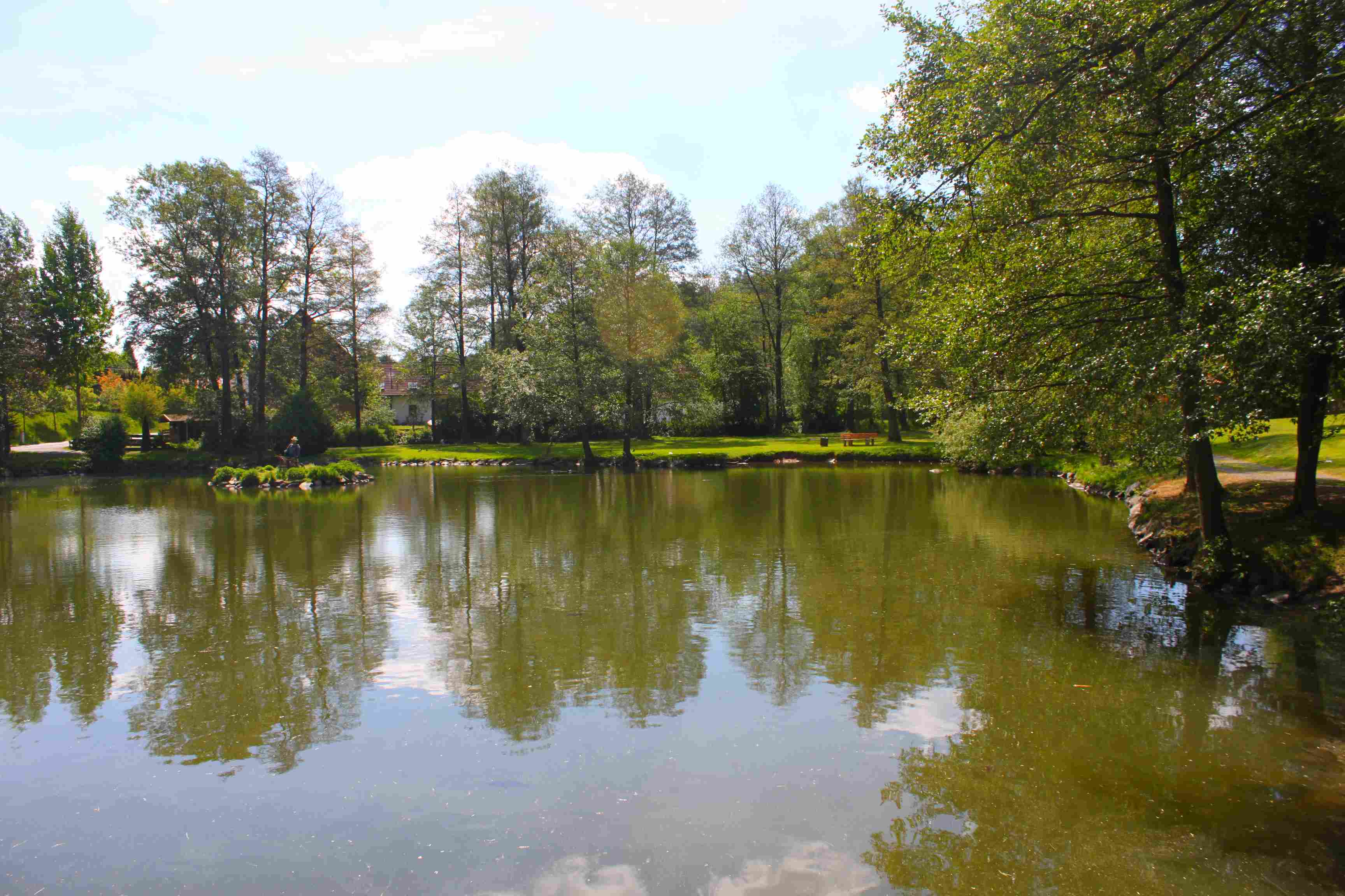 Der Dorfweiher von Marktschorgast